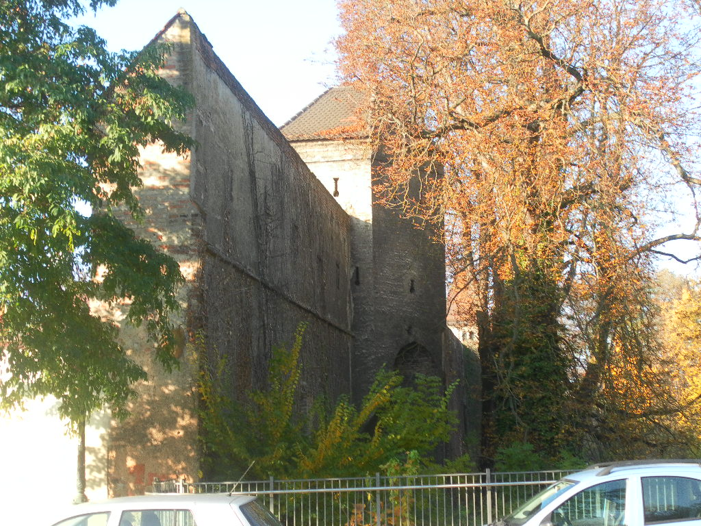 Vogelmauer am Willy-Brandt-Platz Augsburg